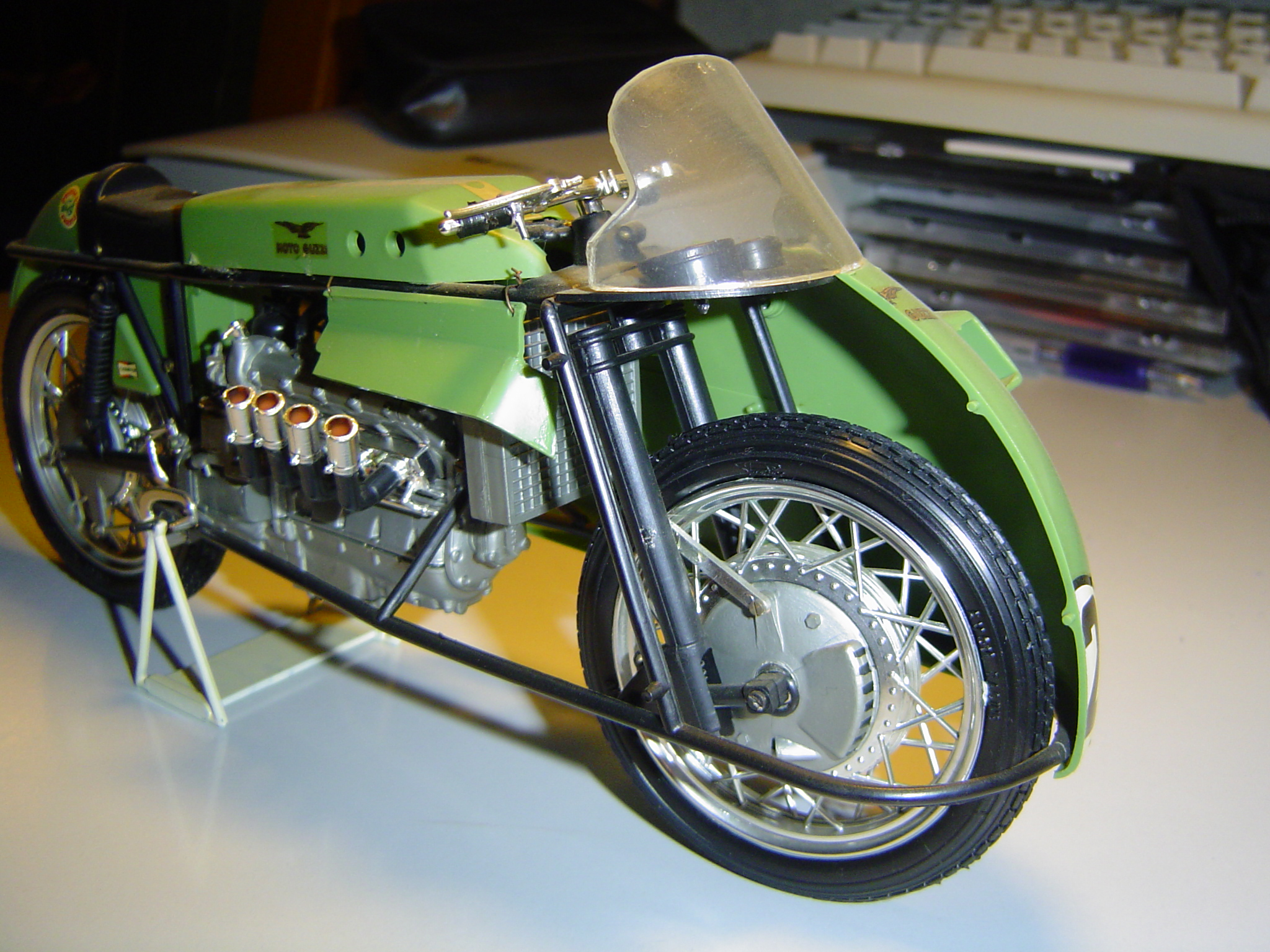 Maquette de Moto Guzzi Quattrocilindri